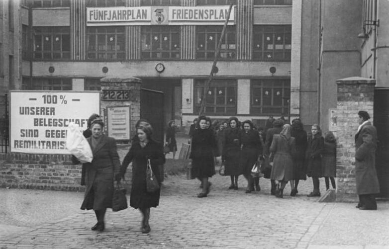 Berlin, Greifswalder Straße, Feierabend Illus Köhler 22.12.50 Berlin 1950 Feierabend. (Werk Fortschritt II, Greifswalder Str.) Leihweise Illus Berlin W8 x Information added by Wikimedia users. banner on the facadedeenFÜNFJAHRPLAN — FRIEDENSPLANFIVE YEAR PLAN — PEACE PLAN banner next to the gatedeen— 100% —UNSERER BELEGSCHAFTSIND GEGEN REMILITARISIERUNG— 100% —OF OUR WORKFORCEARE AGAINST REMILITARISATION